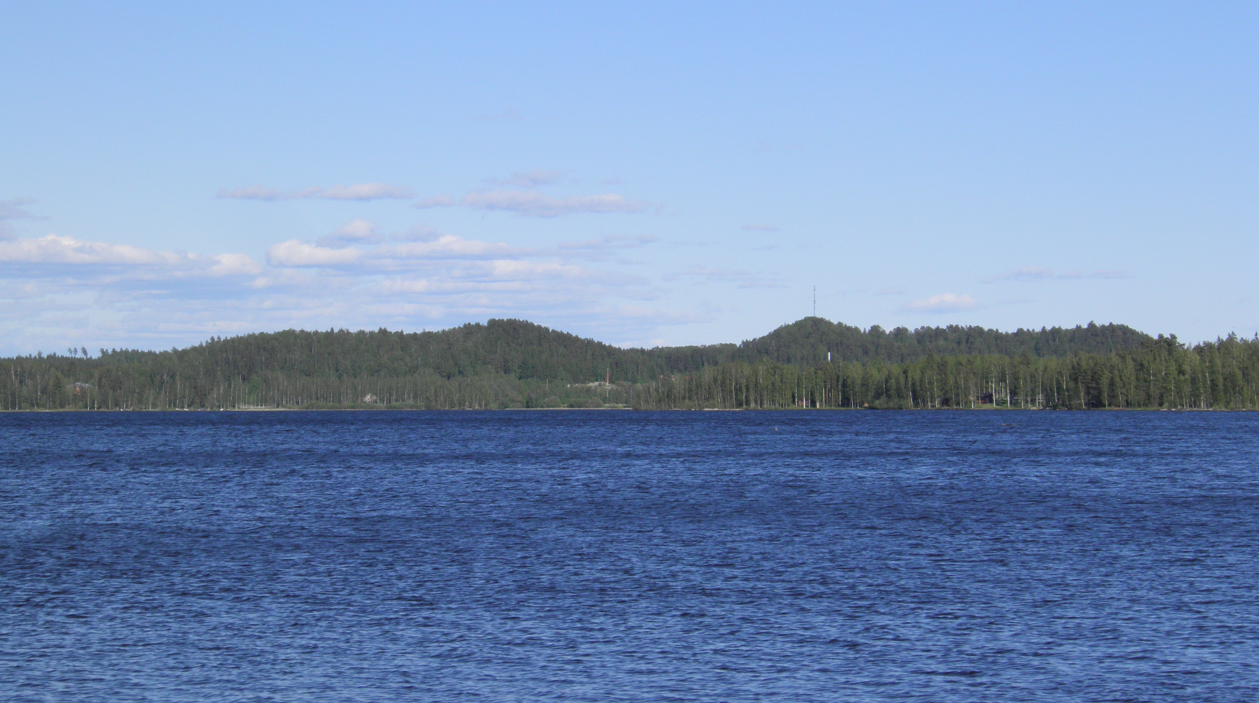 Untulanharjun sivuprofiili Ormajärven etelärannalta noin kolmen kilometrin etäisyydeltä nähtynä. Lammi, Hämeenlinna.